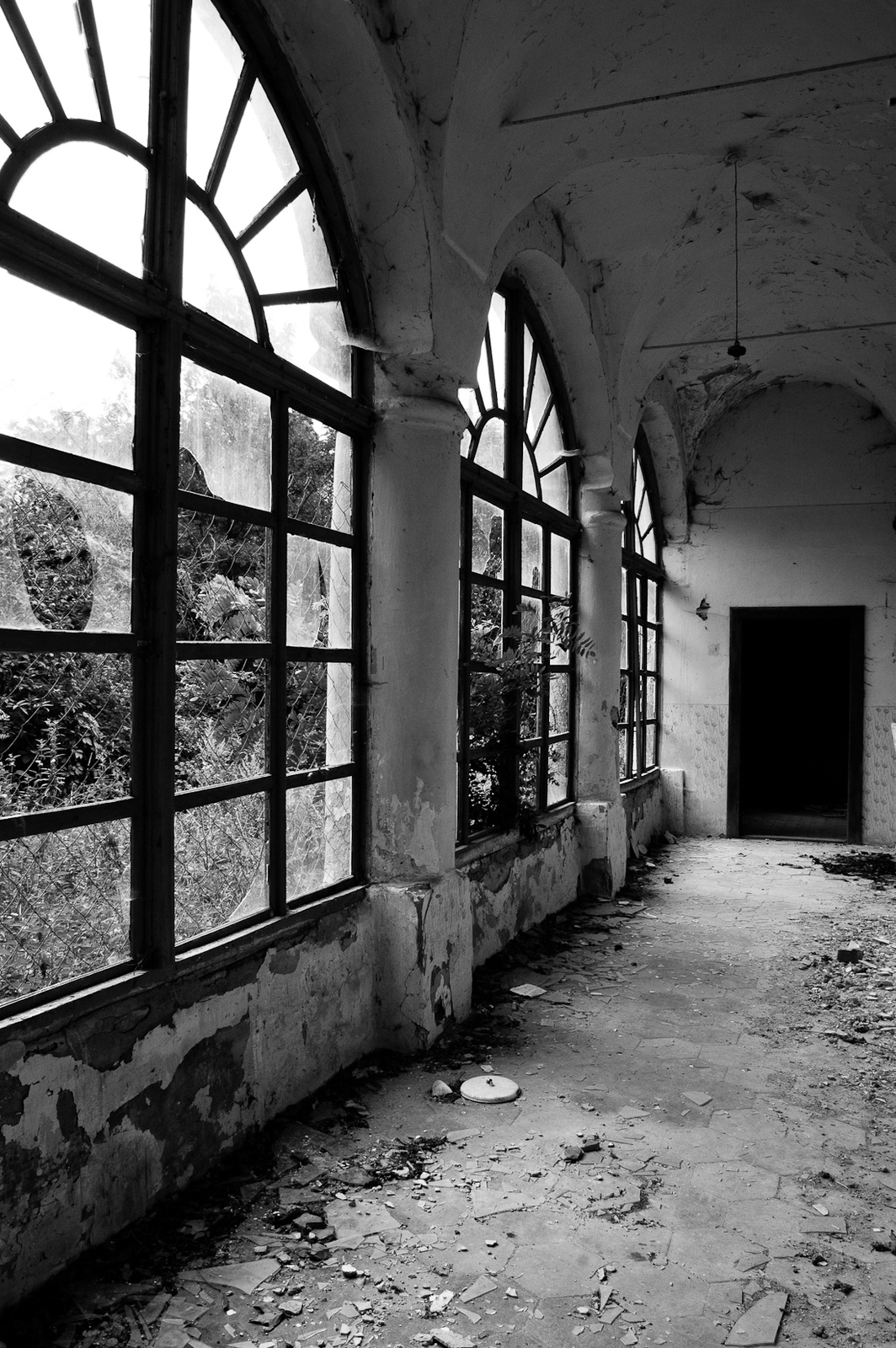 Régi Forintos-kúria (Mihályfa, Kossuth Lajos utca 63.) This is a photo of a monument in Hungary, Identifier: 10934